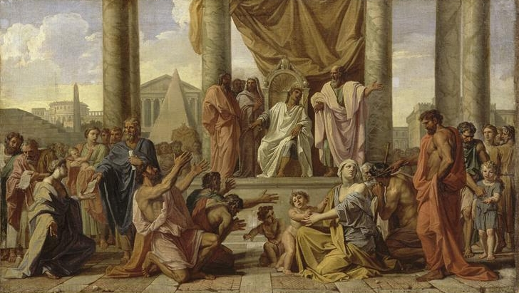 PTOLOMEE PHILADELPHE REND LA LIBERTE AUX JUIFS ; Salon : Salle des gardes de la reine, Grands appartements du Château de Versailles Emplacement : voussure ; oeust